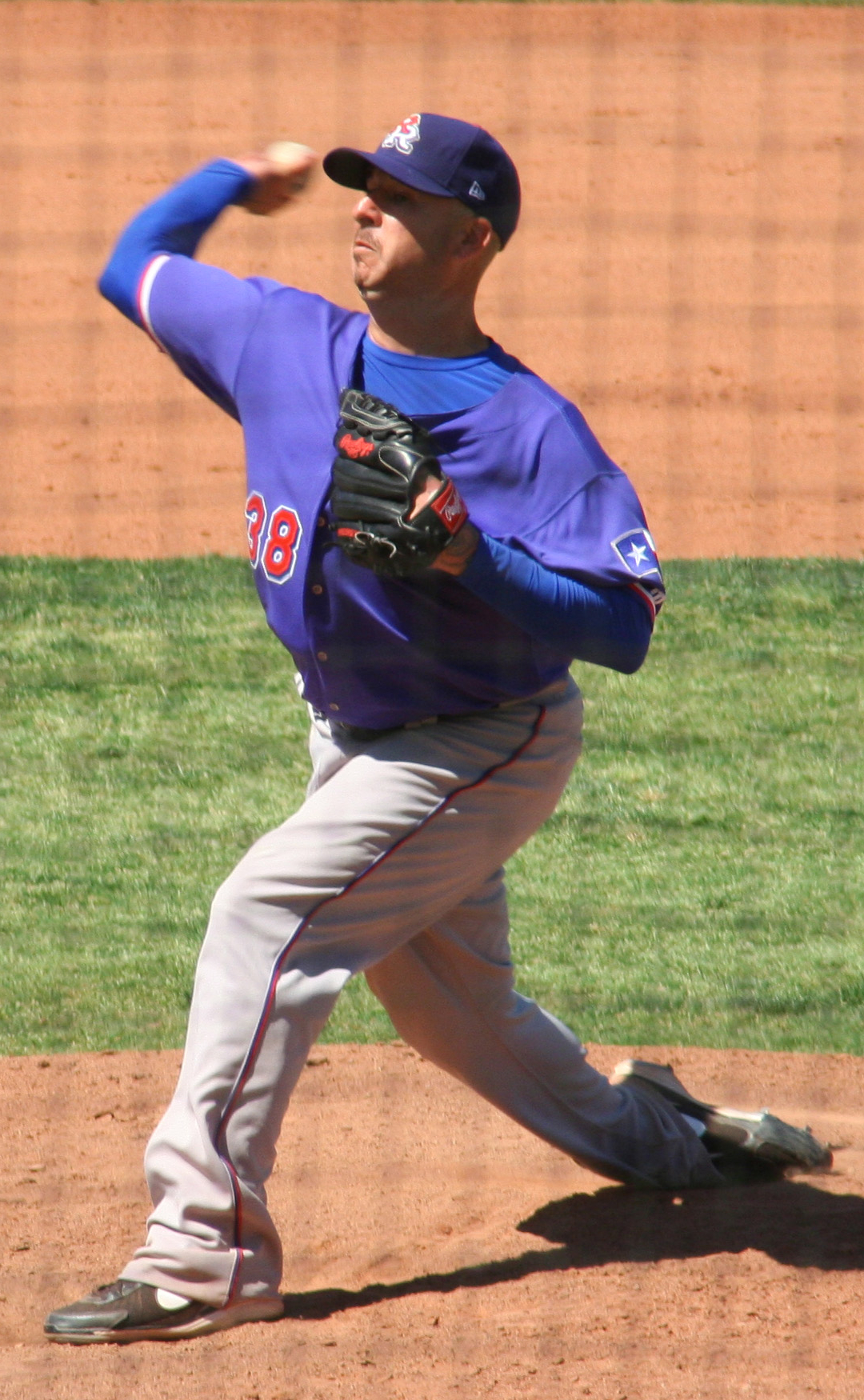 Justin Miller